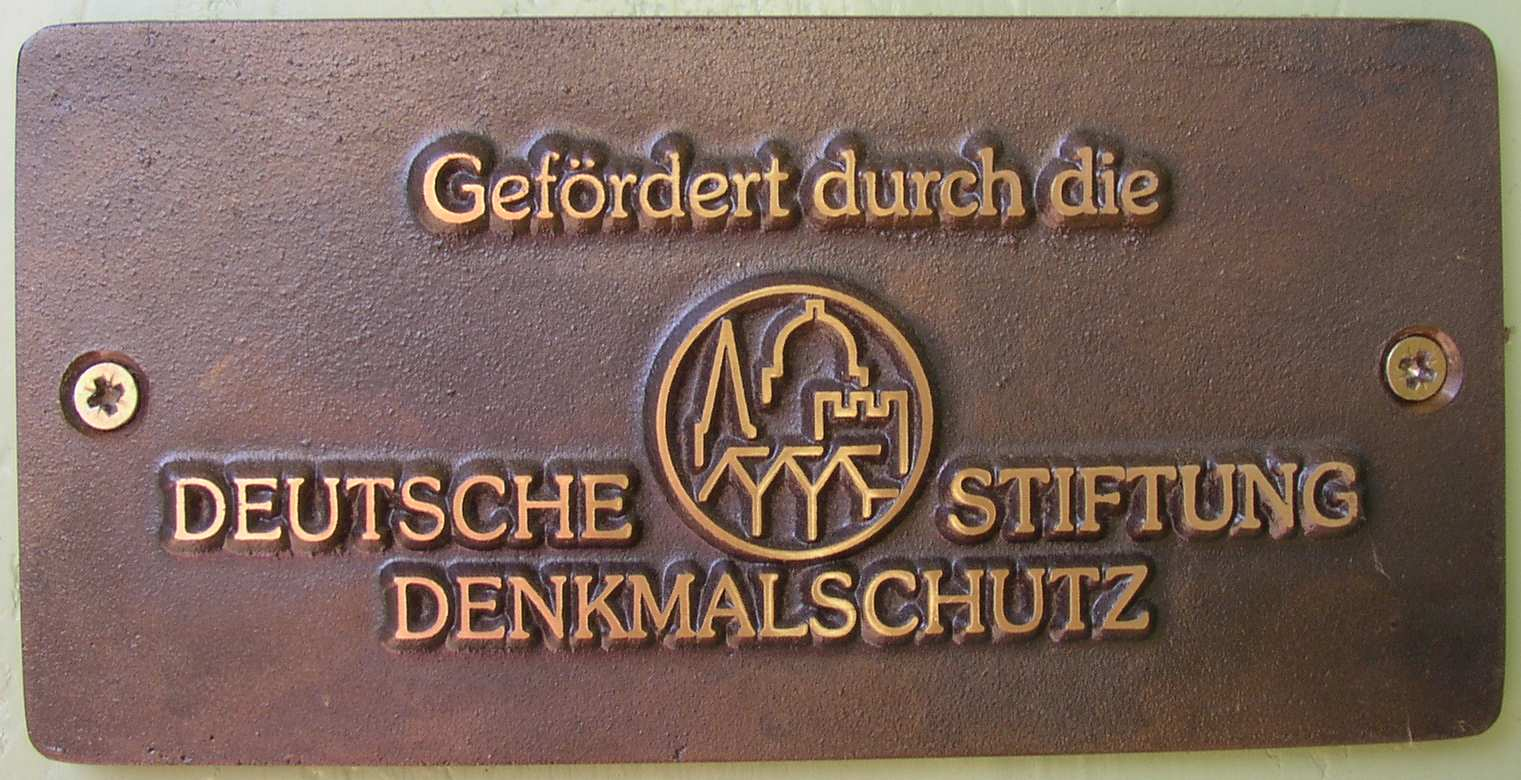 Plakette der Dt. Stift. Denkmalschutz an der ehem. Klosterkirche in Himmelpfort in Brandenburg, Deutschland